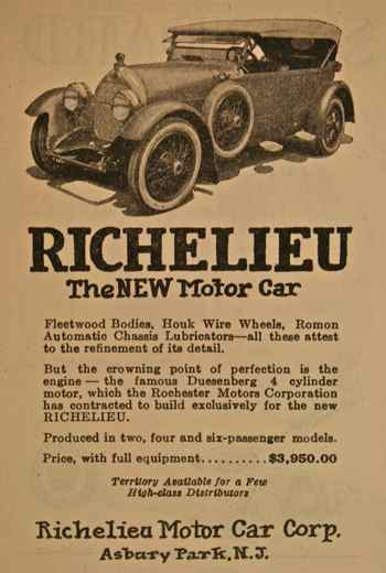 Richelieu Motor Car Corp., Asbury Park, New Jersey